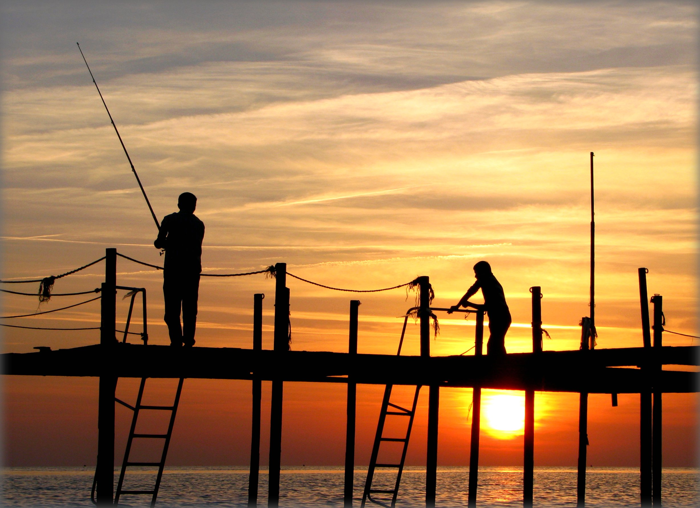 Payallar Alanya